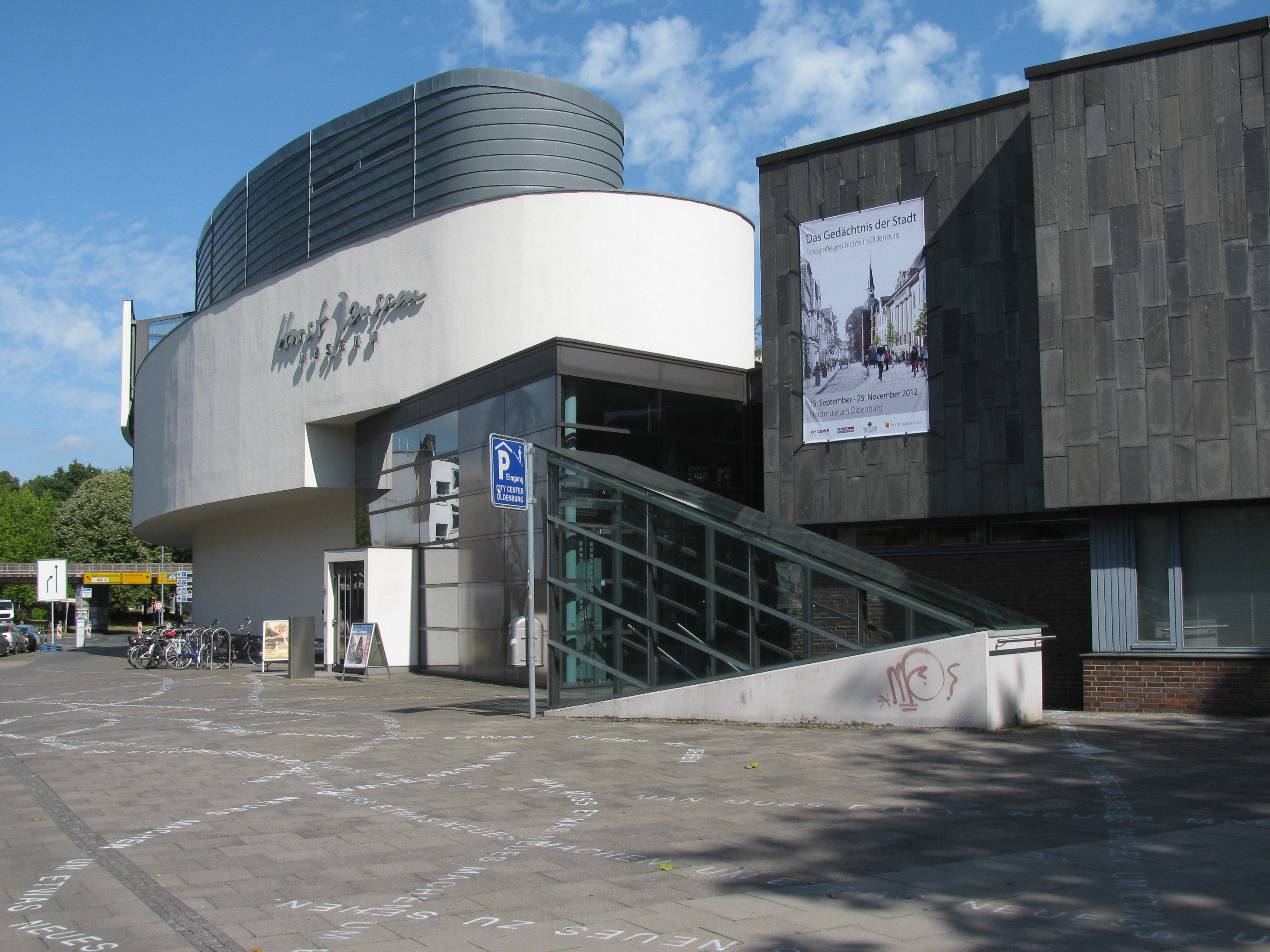 Oldenburg (Oldb.), links das Horst Janssen Museum, rechts das Stadtmuseum.